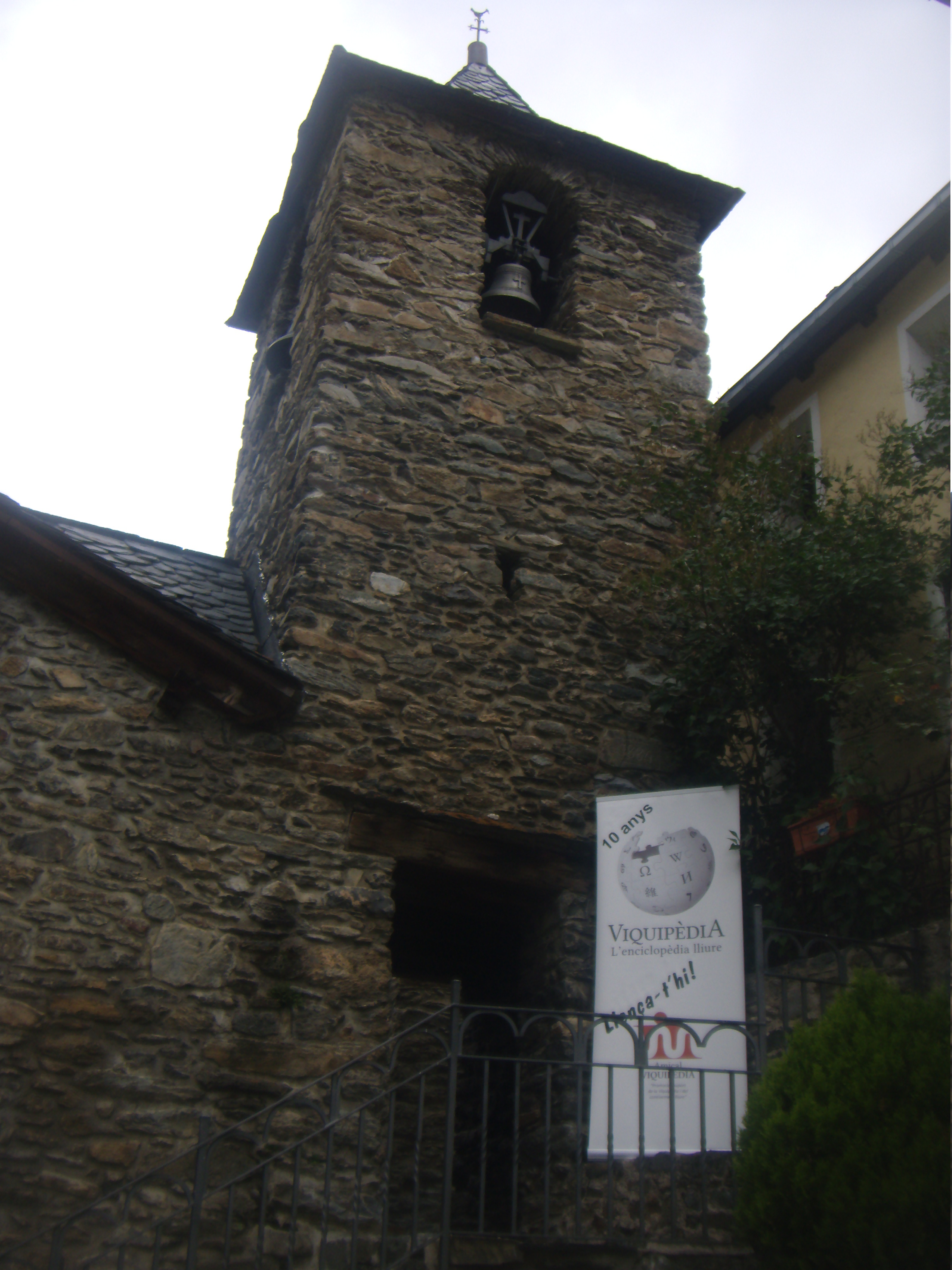 Església de Sant Andreu d'Arinsal